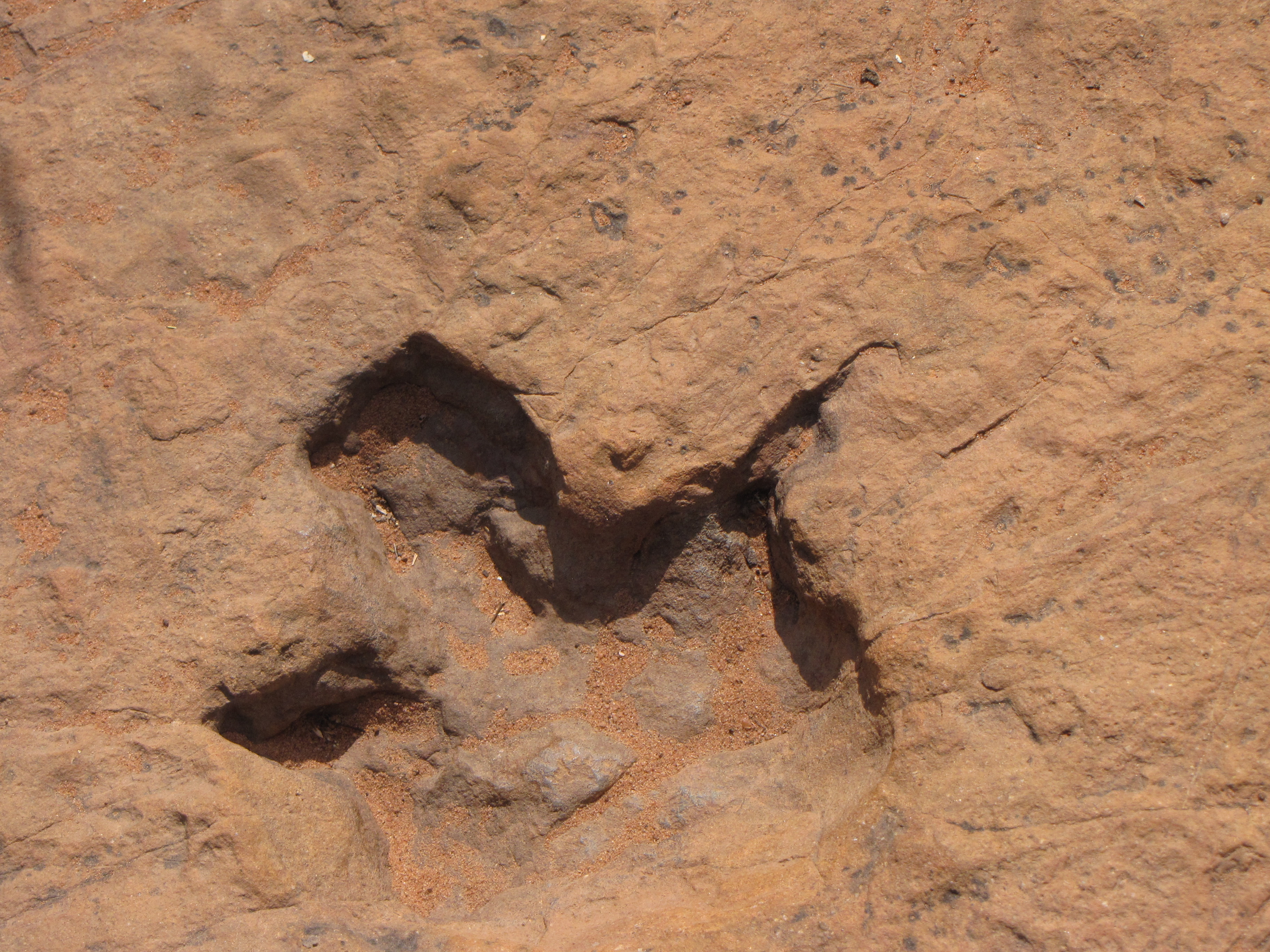 Dinosaurstracks Otjihaenamaparero Namibia